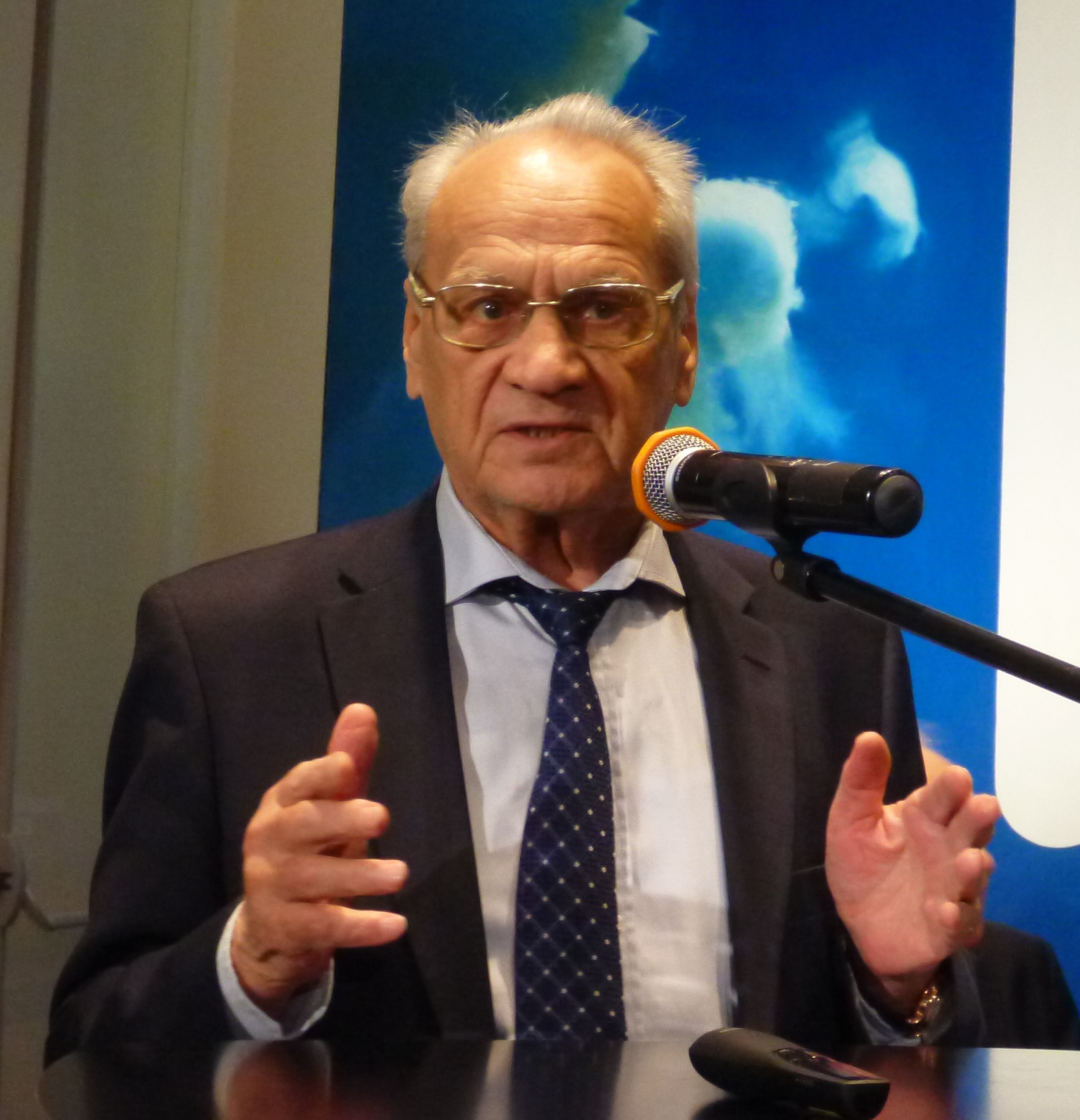 Вячеслав Александрович Михайлов бывший министр Российской Федерации в Ельцин-центре 9 декабря 2019 года